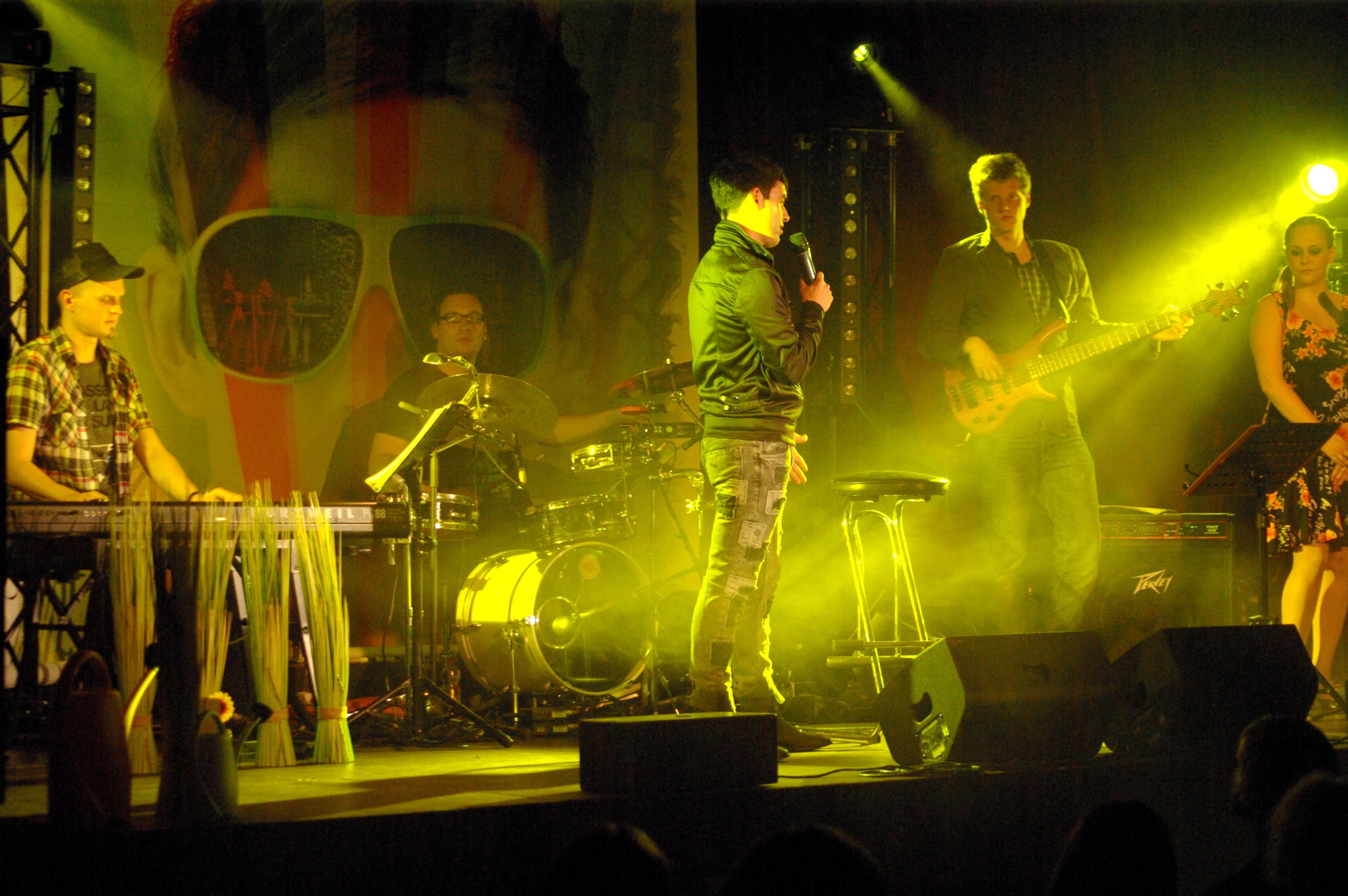 Daniel Küblböck Schrebergarten-Tourstart Tempodrom Berlin 2010